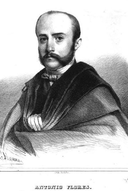 Le journaliste et écrivant espagnol Antonio Flores Algovia, gravure du XIXe siècle..